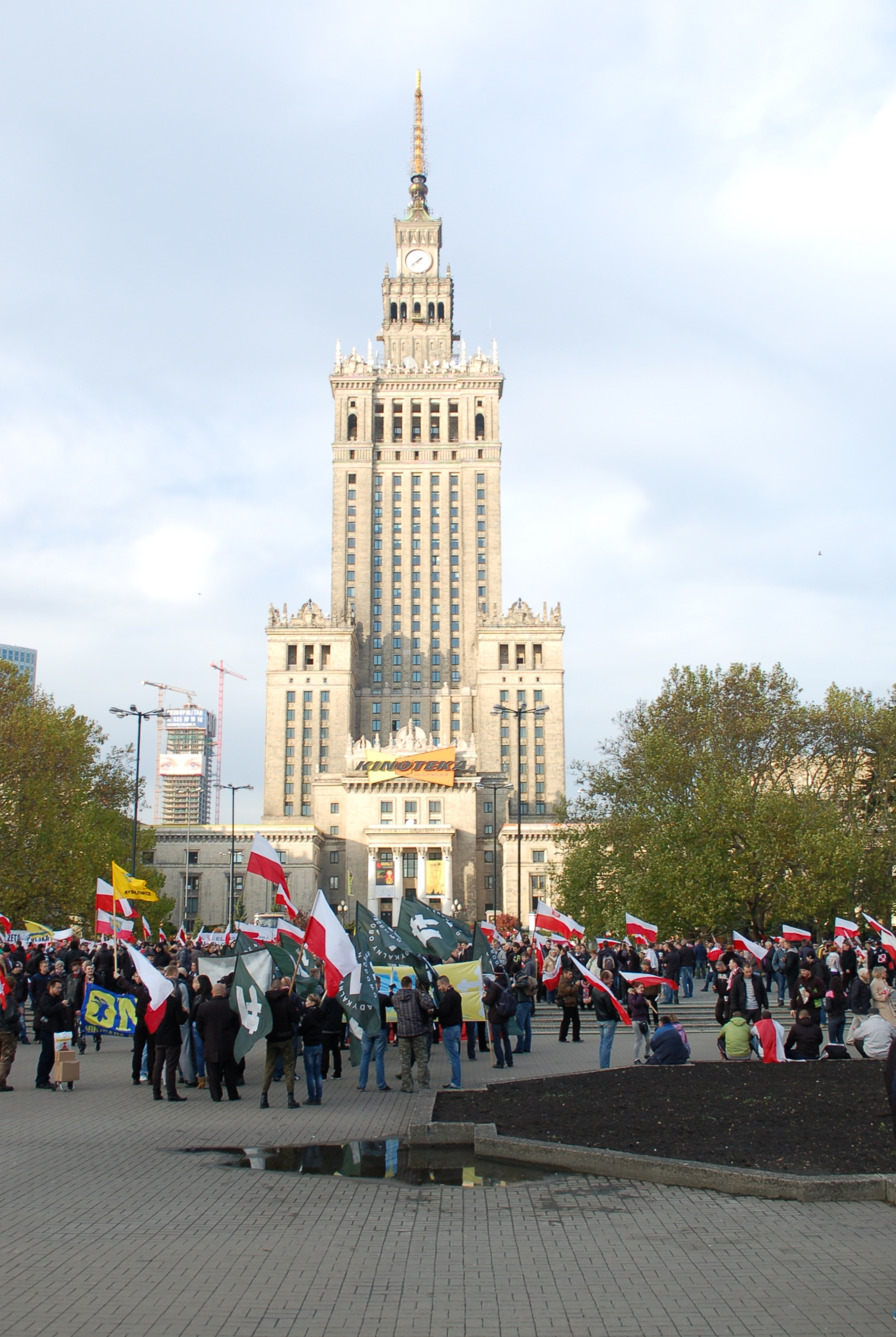 Independence March Warsaw 11.11.2012